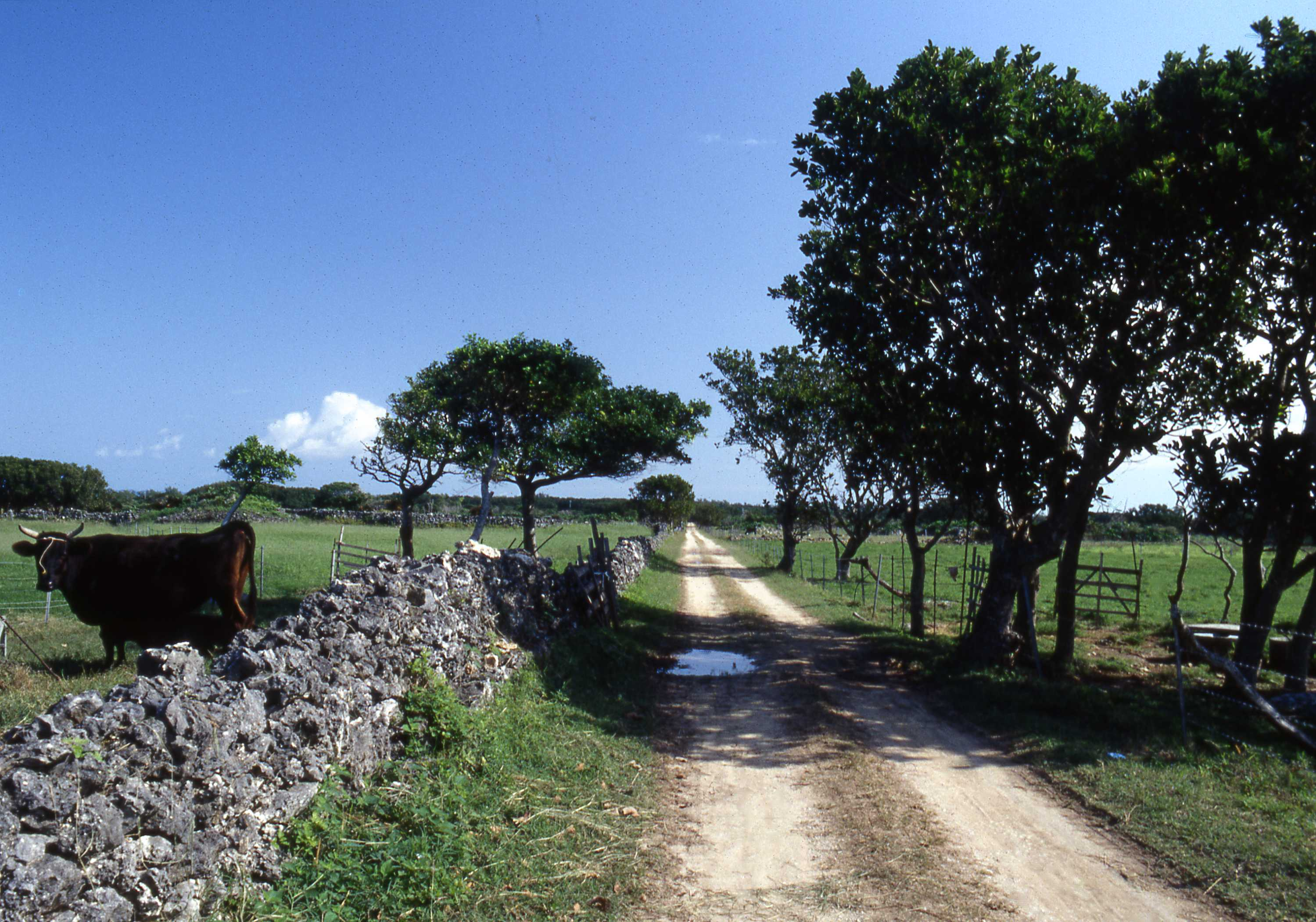 八重山諸島･黒島